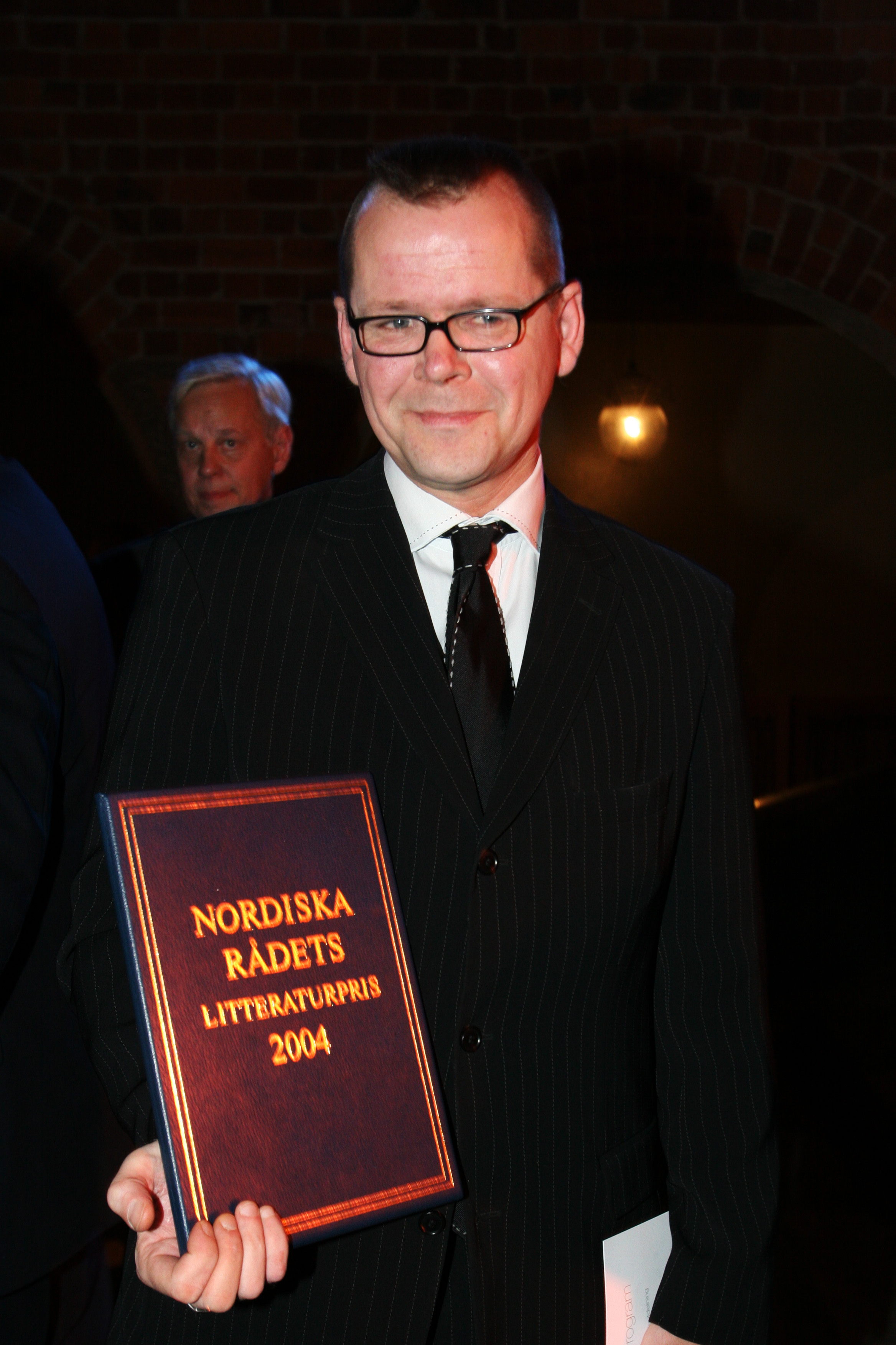 Kari Hotakainen, vinnare av Nordiska rådets litteraturpris år 2004